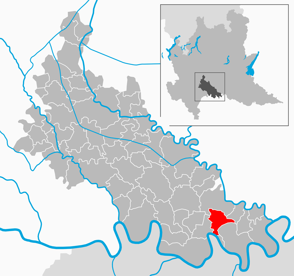 Il comune di Corno Giovine nella provincia di Lodi